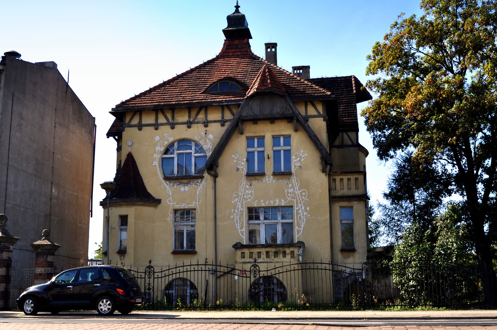 Ostrów Wielkopolski, ul. Raszkowska 47 - "Willa Schultza" z 1905 r. (zabytek nr 451/A)